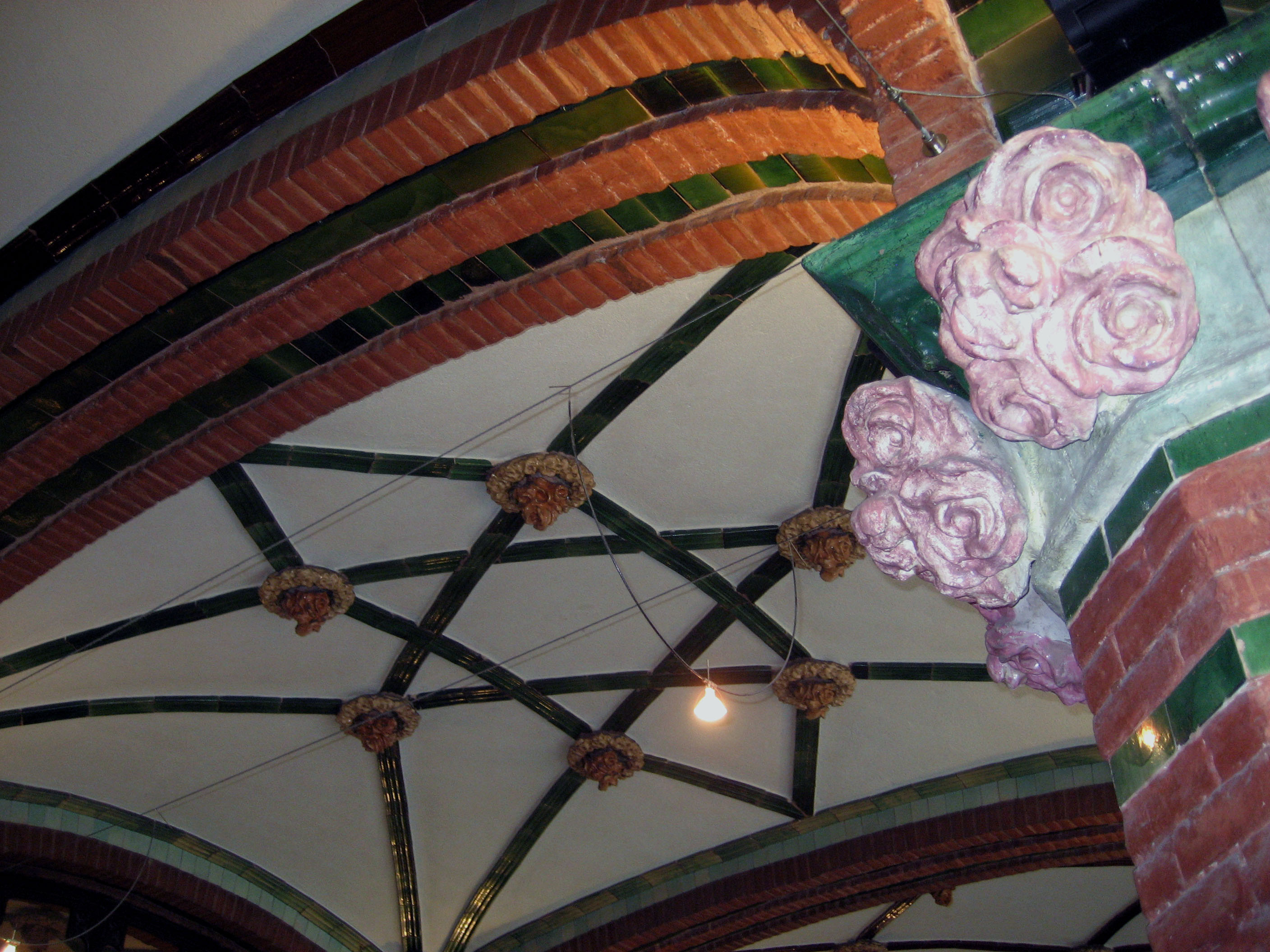 Detalle del techo del Palacio de la Música Catalana en Barcelona